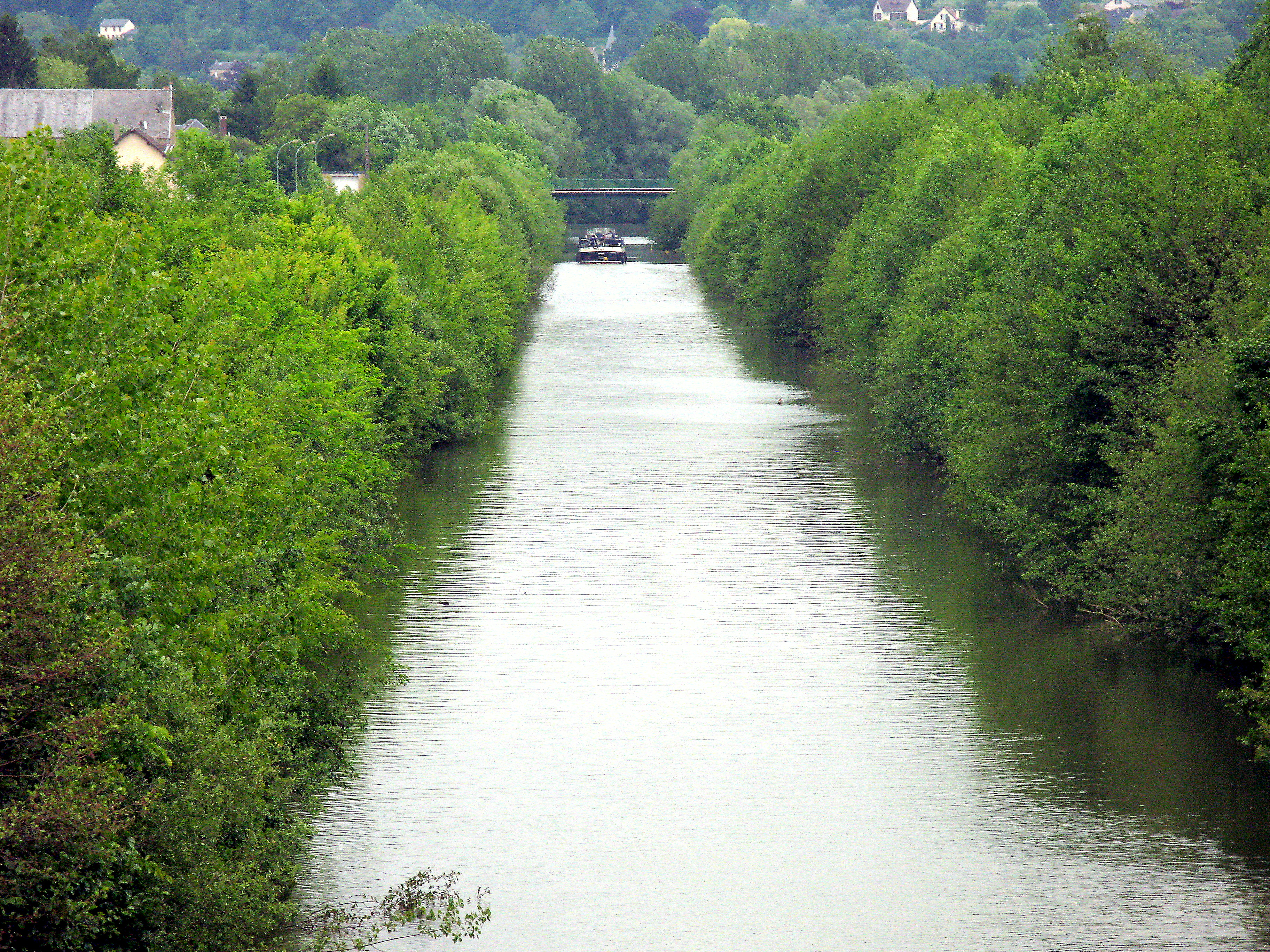 De Canal de Glaire bei Sedan